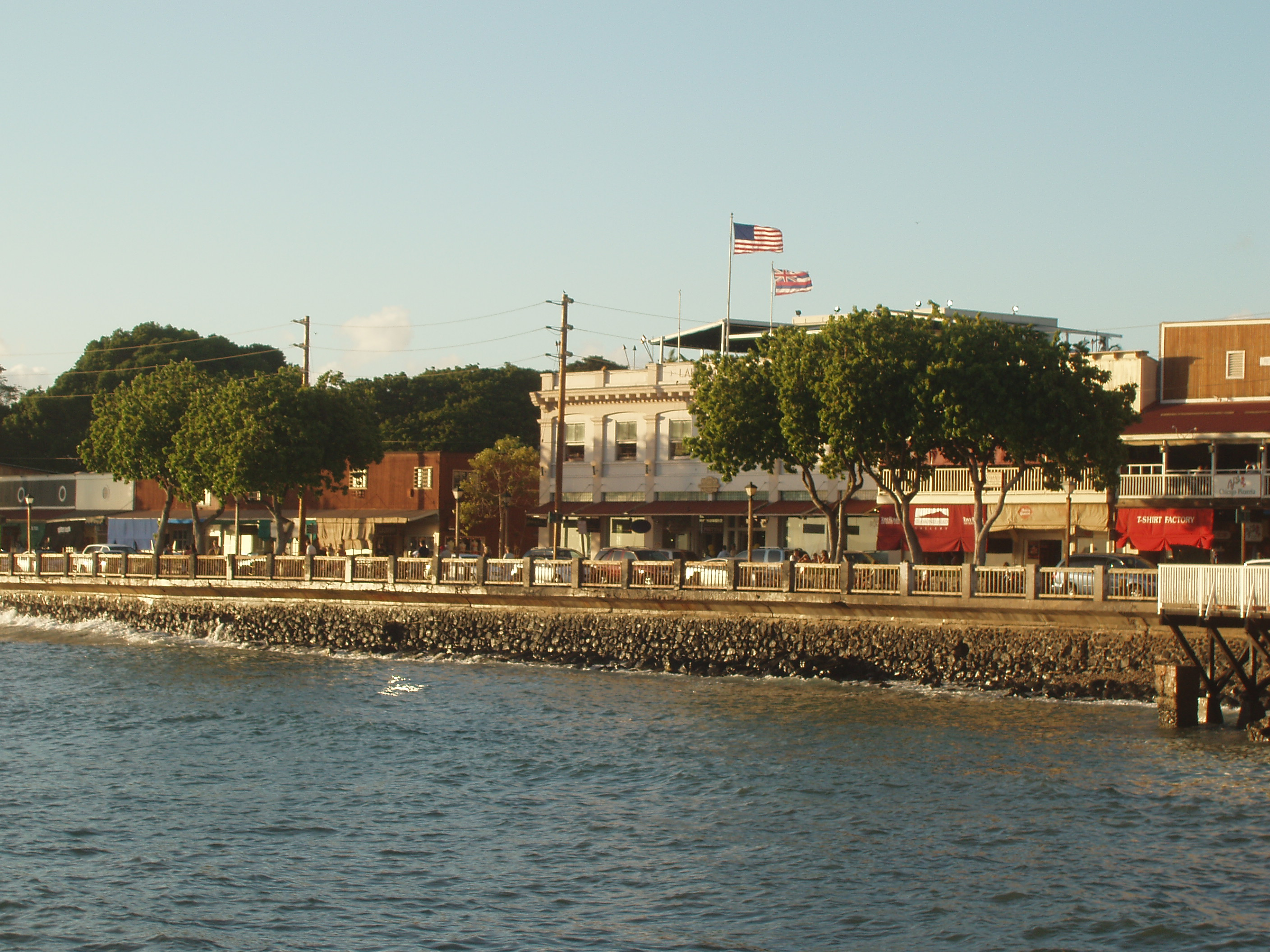 Lāhainā oceanfront